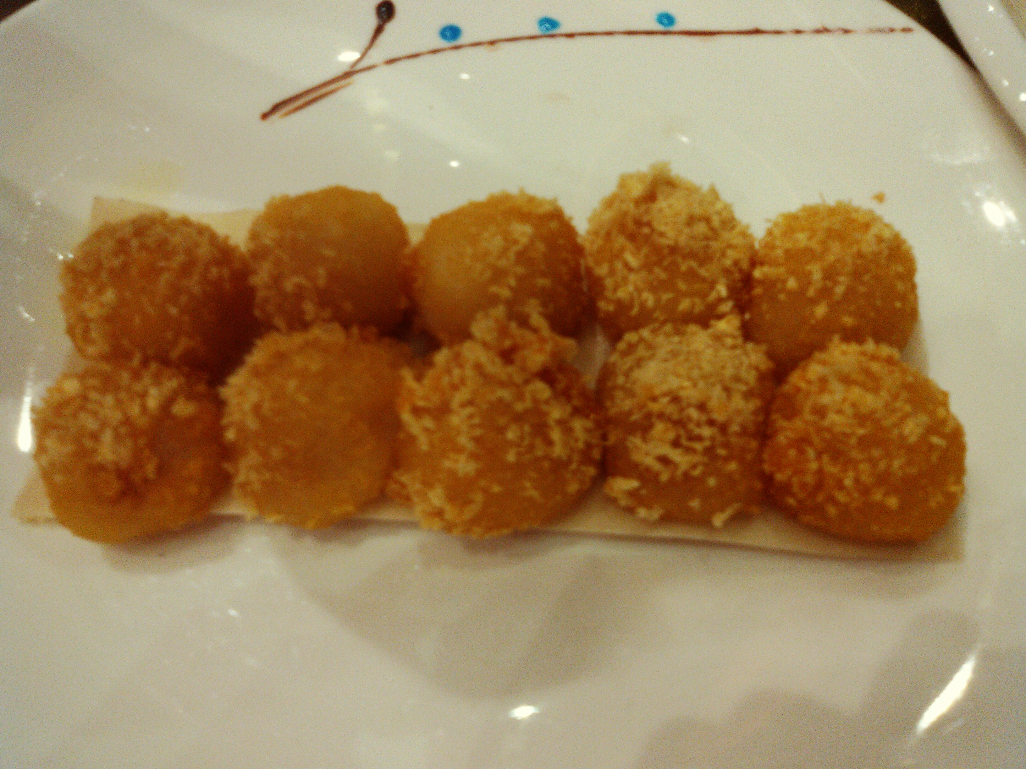 中文（中国大陆）: 2015年5月，宴会席间小吃——时来运转。 文言: 時維乙未，四月十四。會賓客大宴，上小食，曰「時來運轉」。